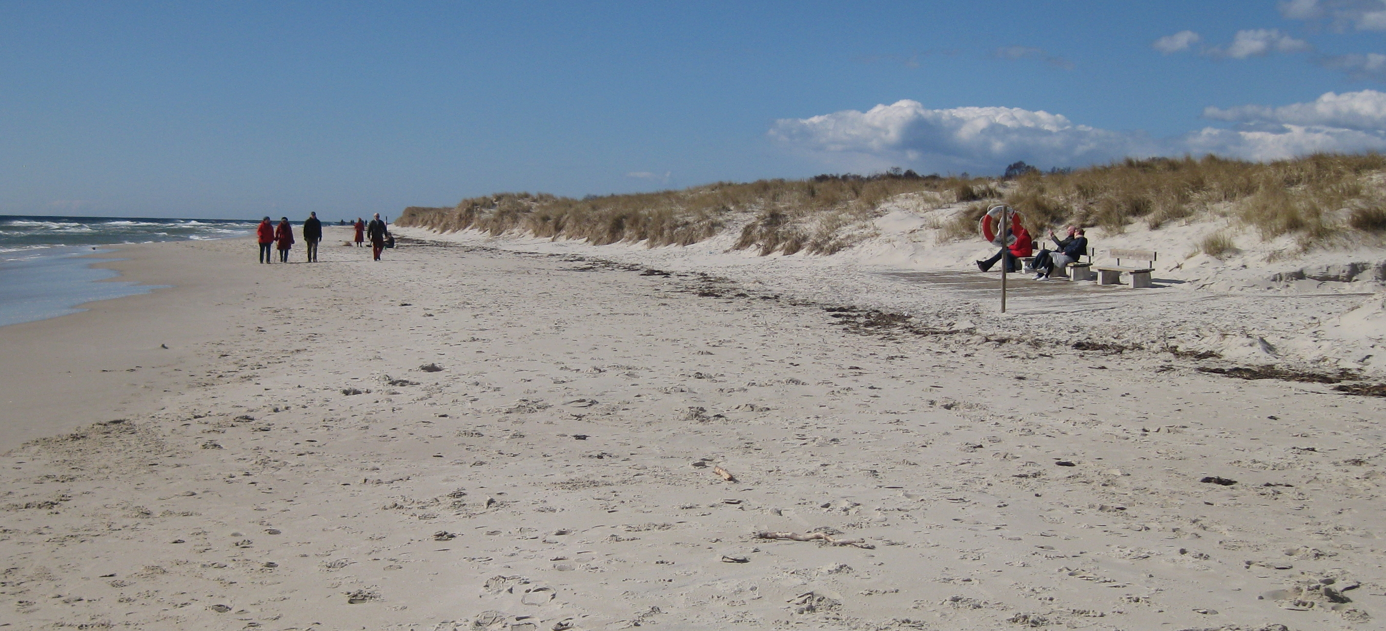 Stranden vid Sandhammaren påskdagen 2012